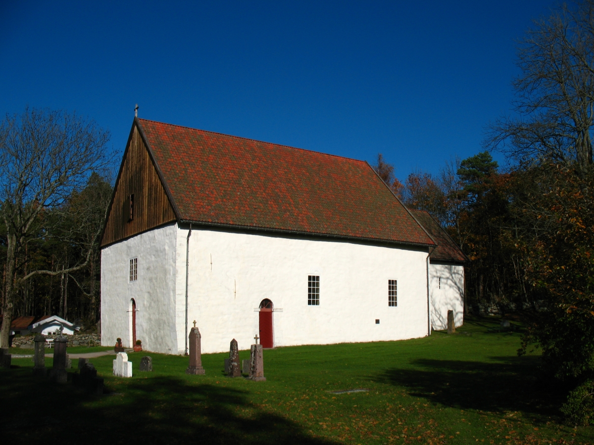 Hvaler kirke sett fra sørvest